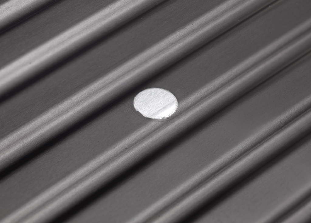 Kontaktfläche auf einem Aluminiumteil